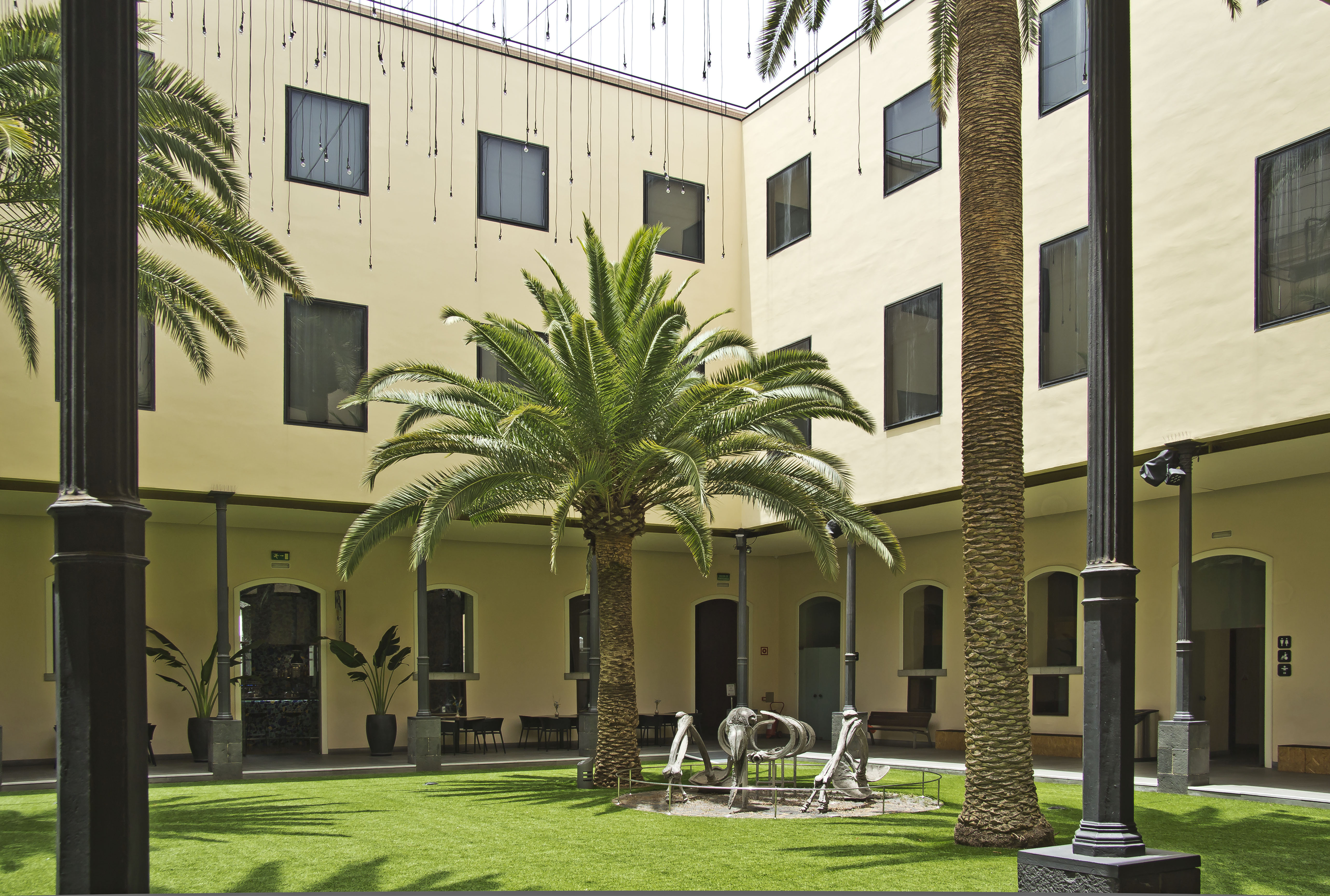 Patio Las Palmeras im Antiguo Hospital Civil Santa Cruz de Tenerife (Museo de la Naturaleza y el Hombre)